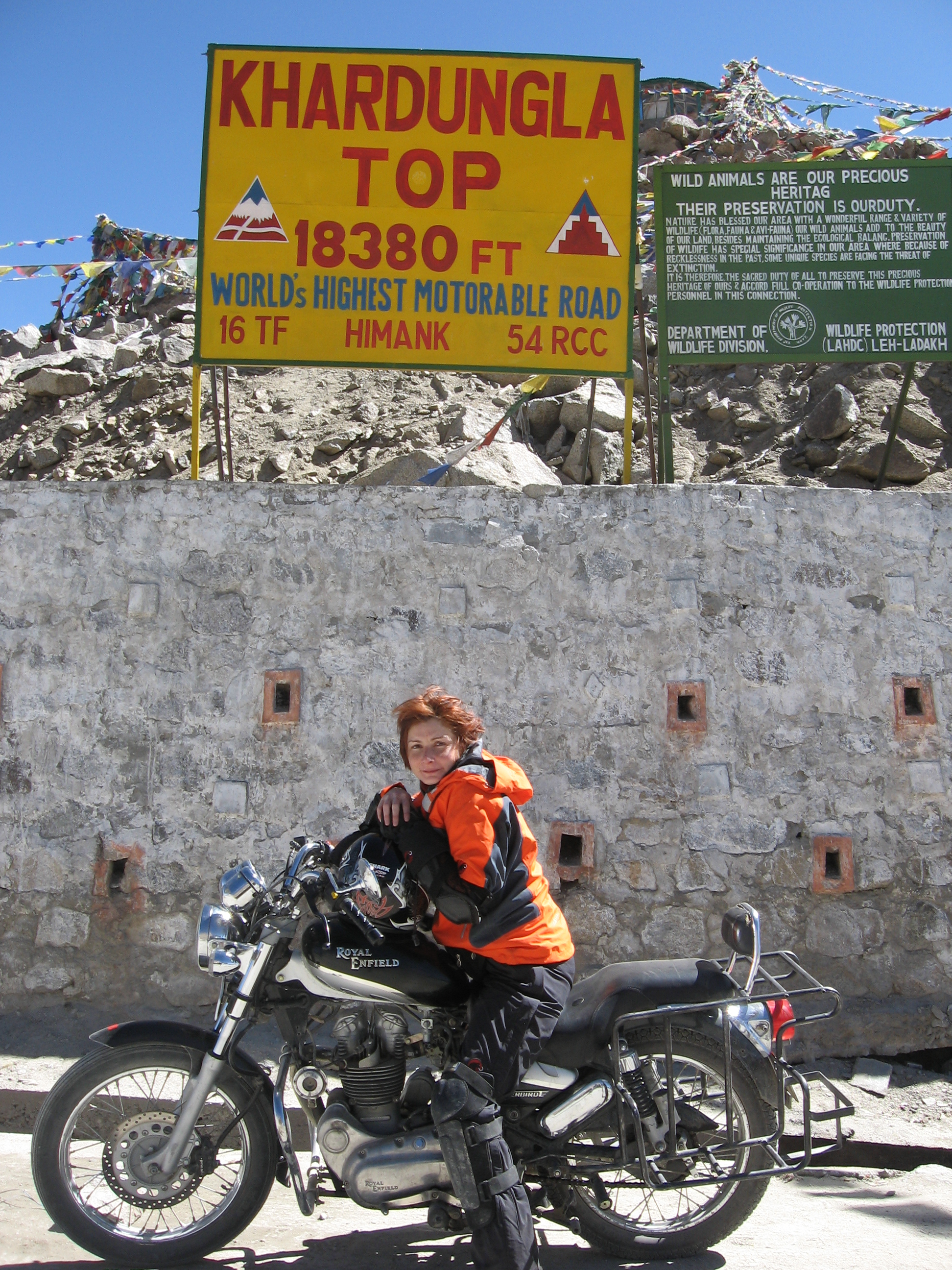 Elena la 5602 m, cel mai inalt punct accesibil cu vehicule motorizate din lume